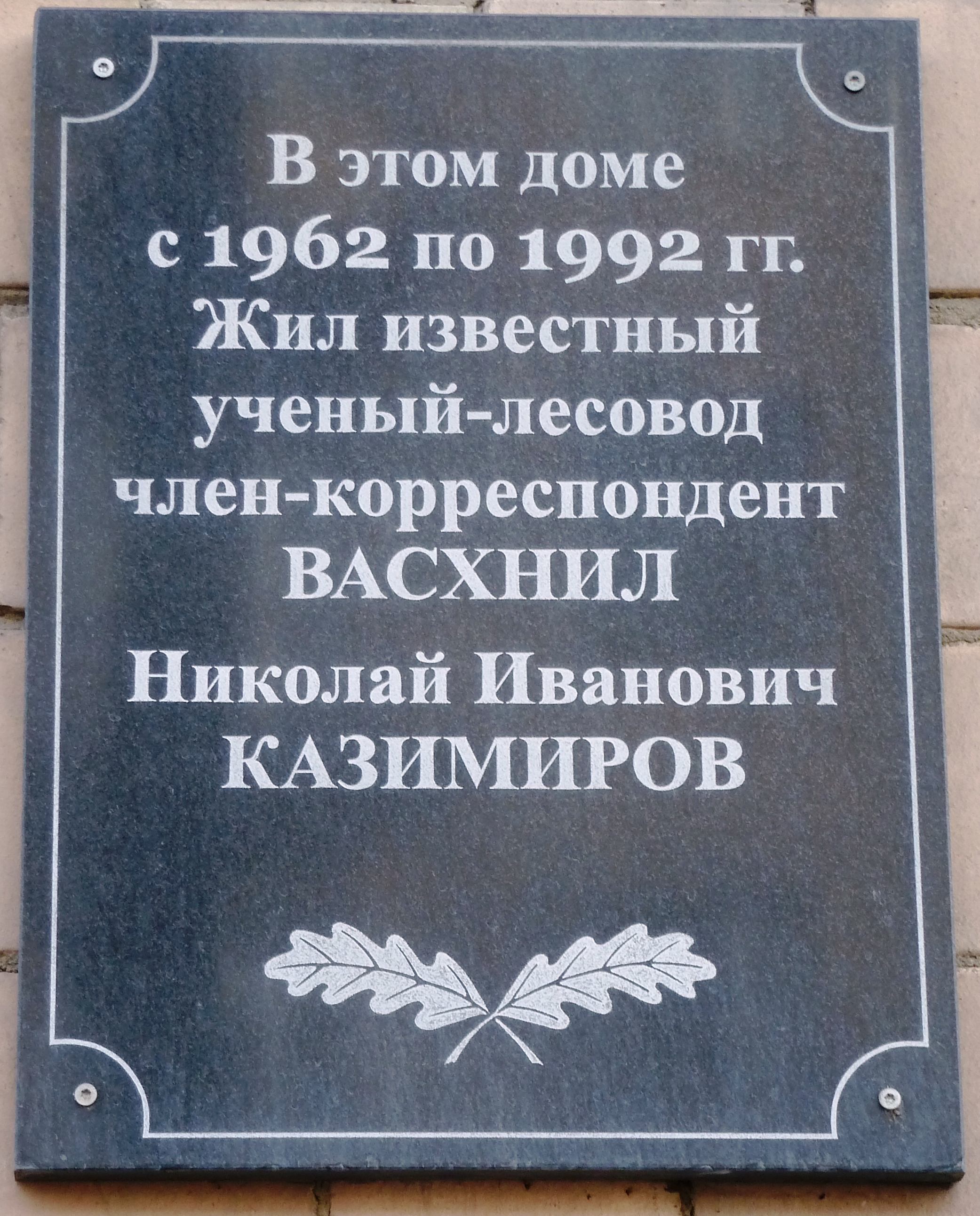 Памятная доска Казимирову Н.И. в Петрозаводске на ул.Куйбышева д.9